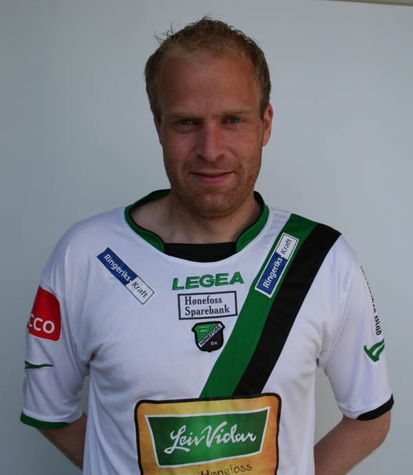 Lars Lafton, norsk fotballspiller som spiller for Hønefoss Ballklubb.